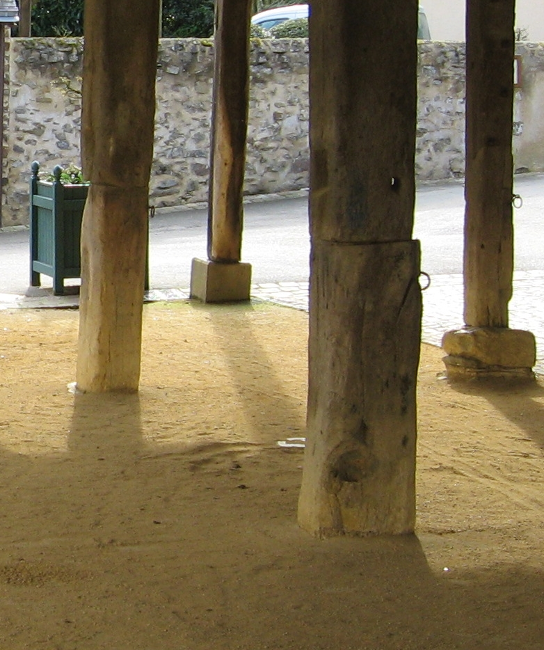 Halles de Saint-Denis-d'Anjou (France), piliers coupés